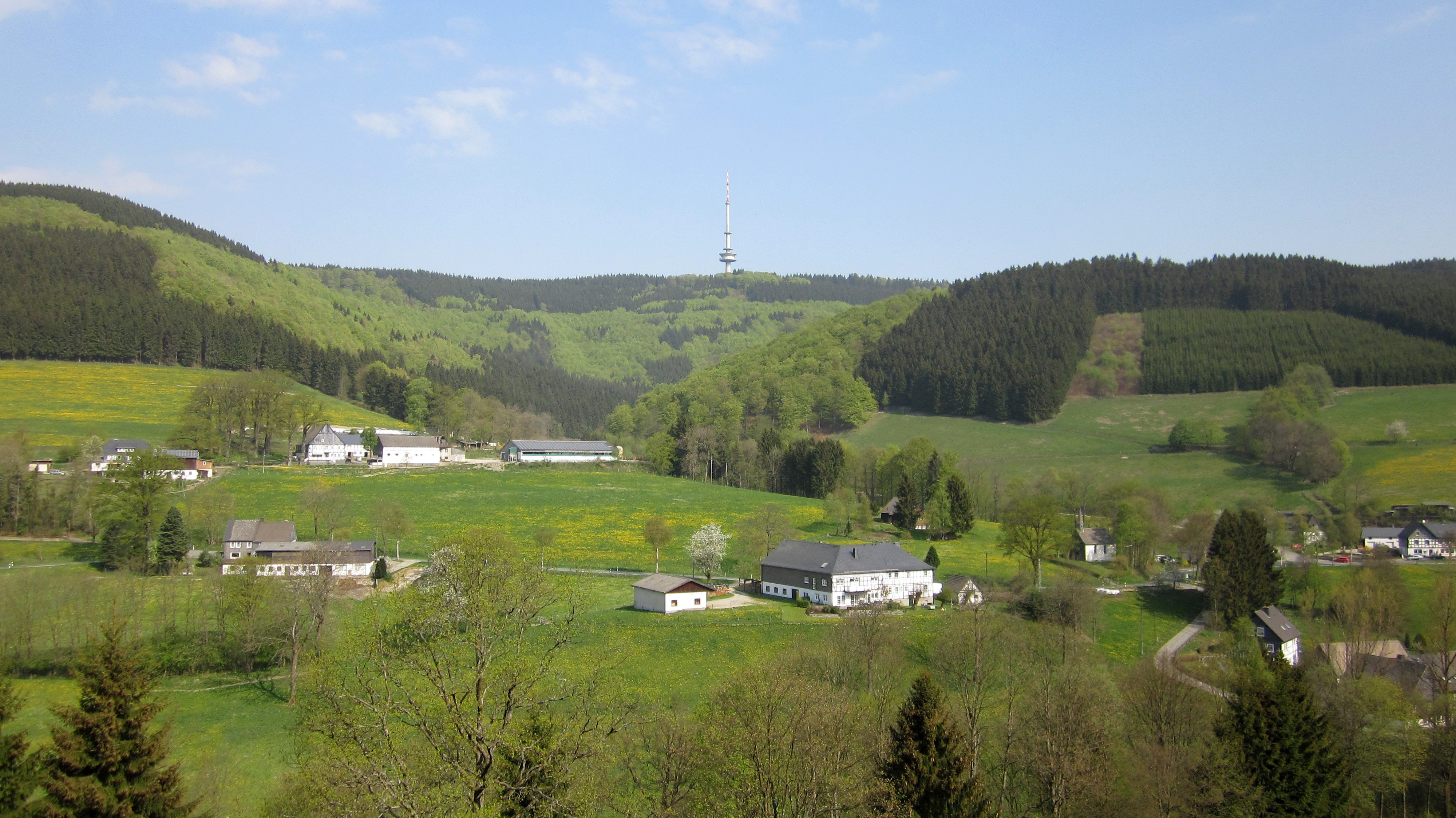 Blick auf Mittelsorpe. Im Hintergrund der Fernmeldeturm Bödefeld auf dem Hunaumassiv.